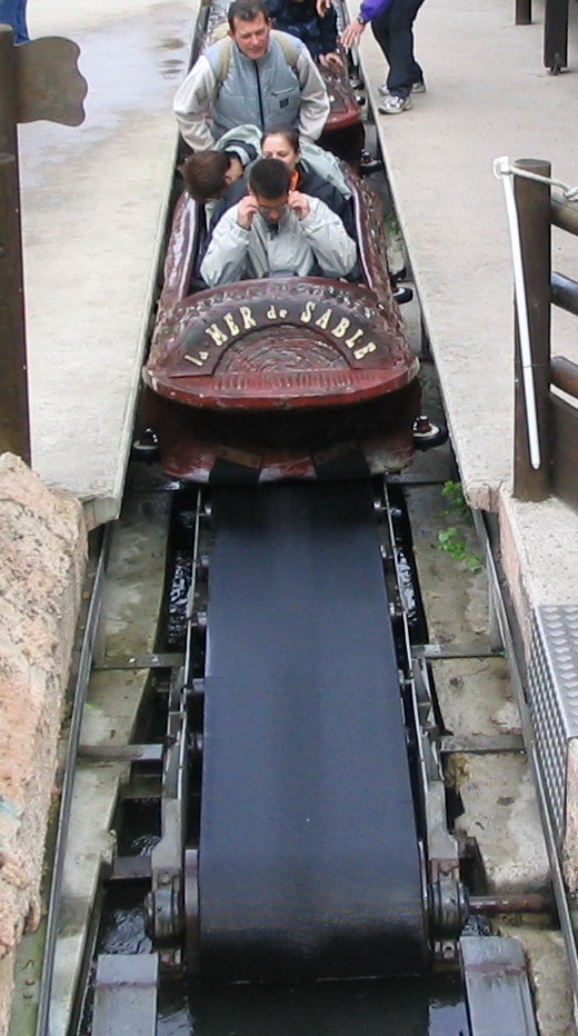 Log Flume Station at Mer de Sable